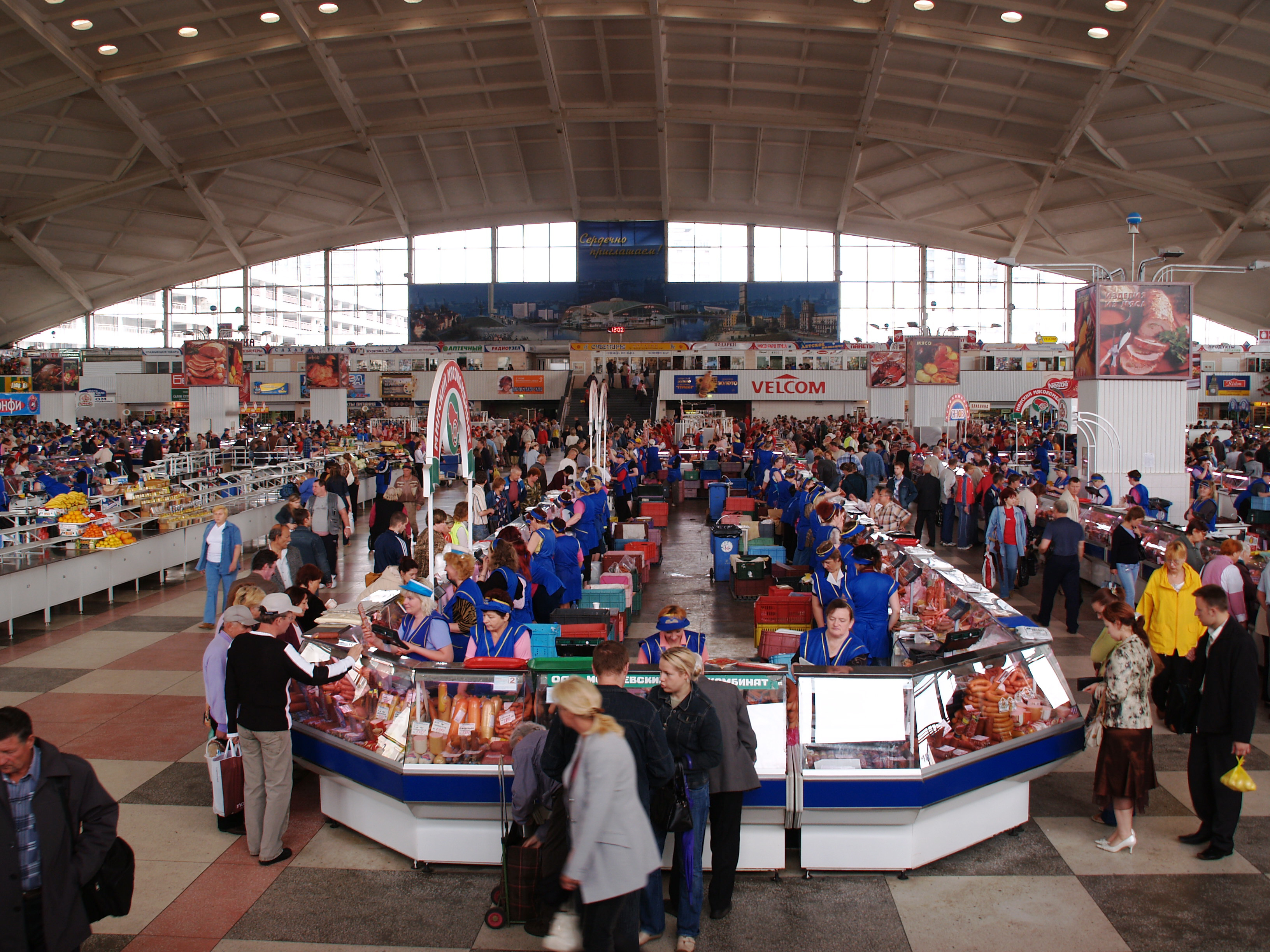 Kamarowski market, Minsk